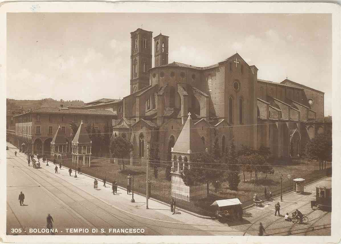 BO Bologna Tempio di San Francesco